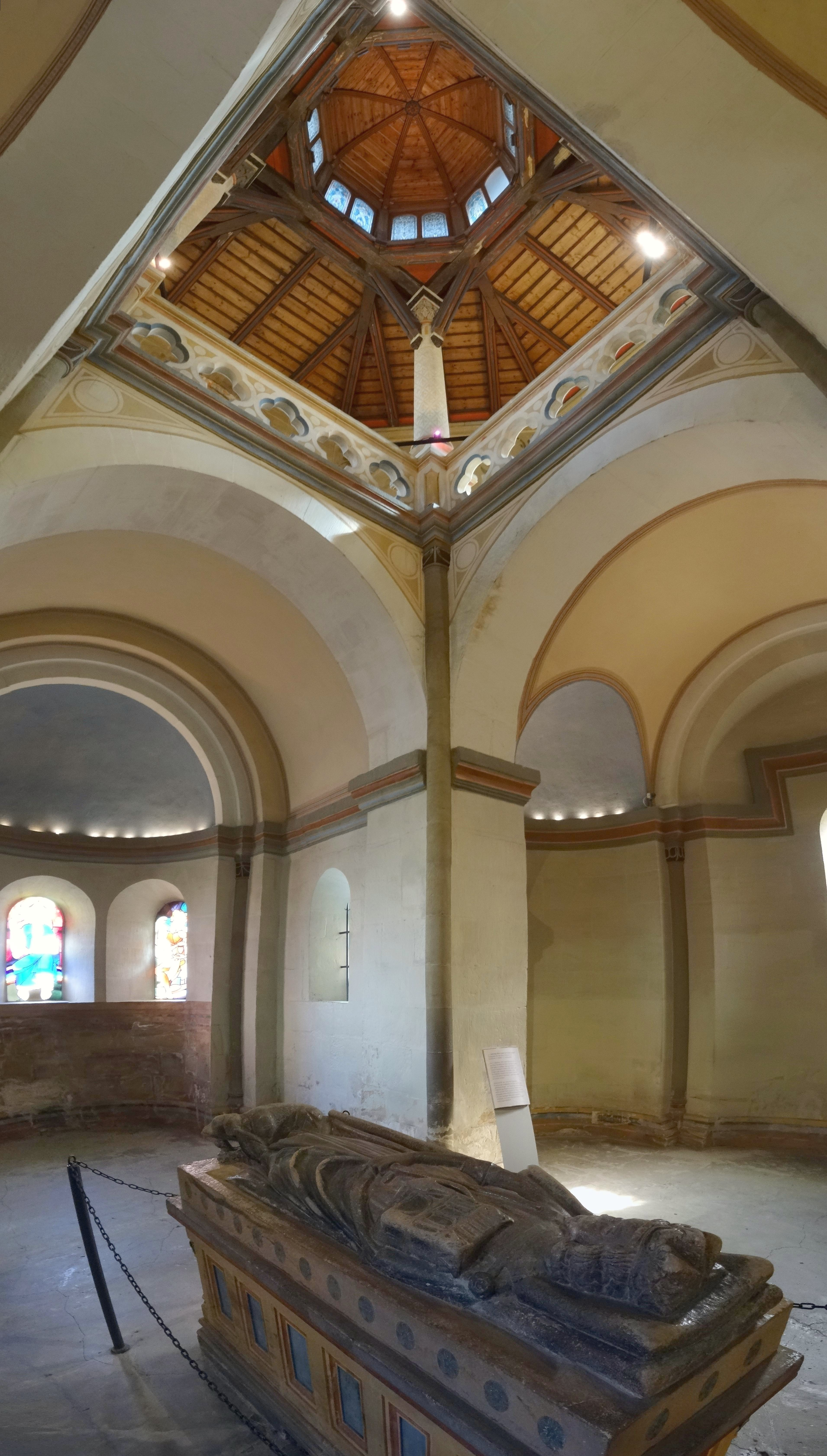 Pfalzkapelle St. Ulrich mit dem Sarkophag Heinrich III.